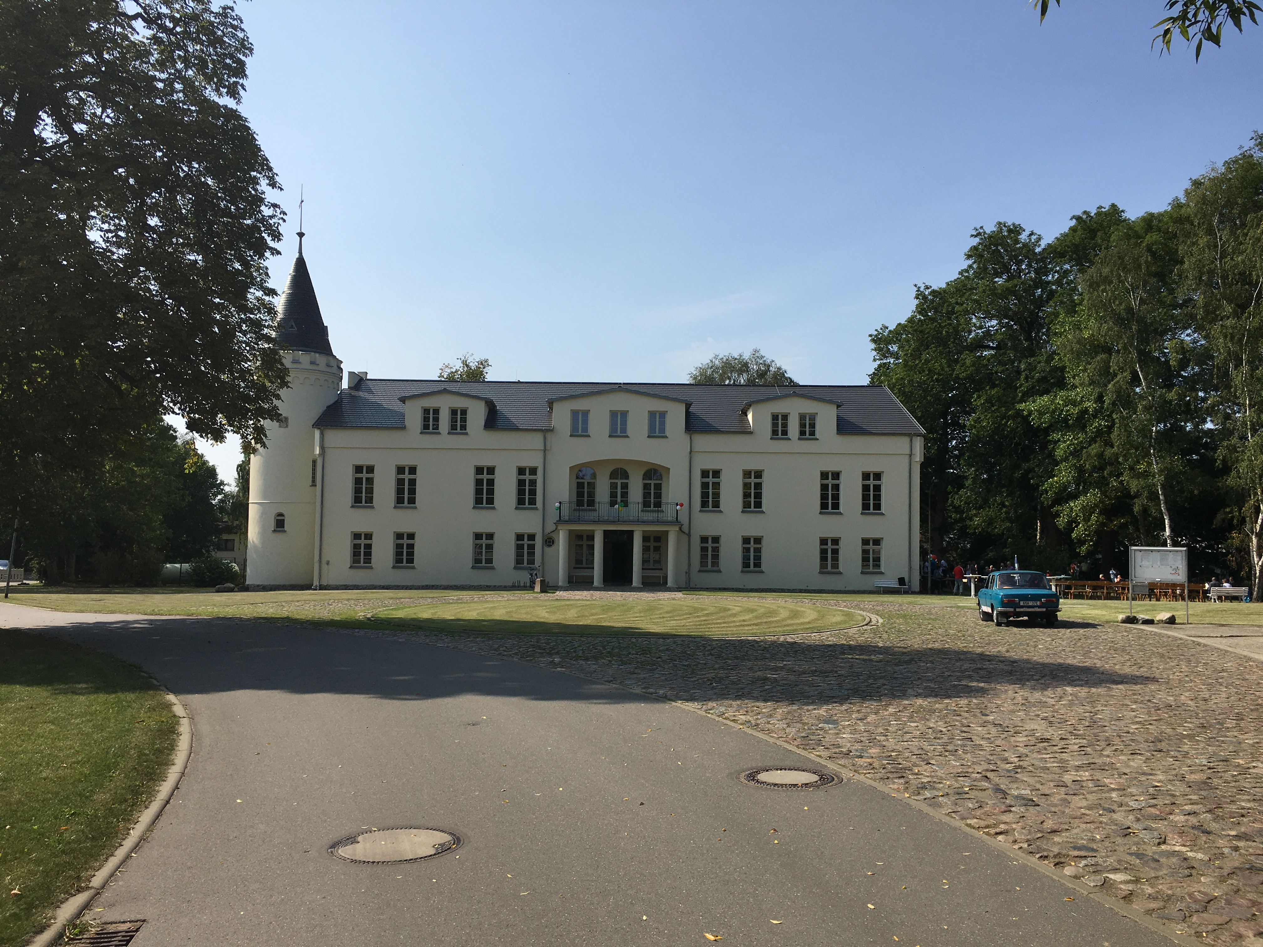 Herrenhaus in Bandelstorf